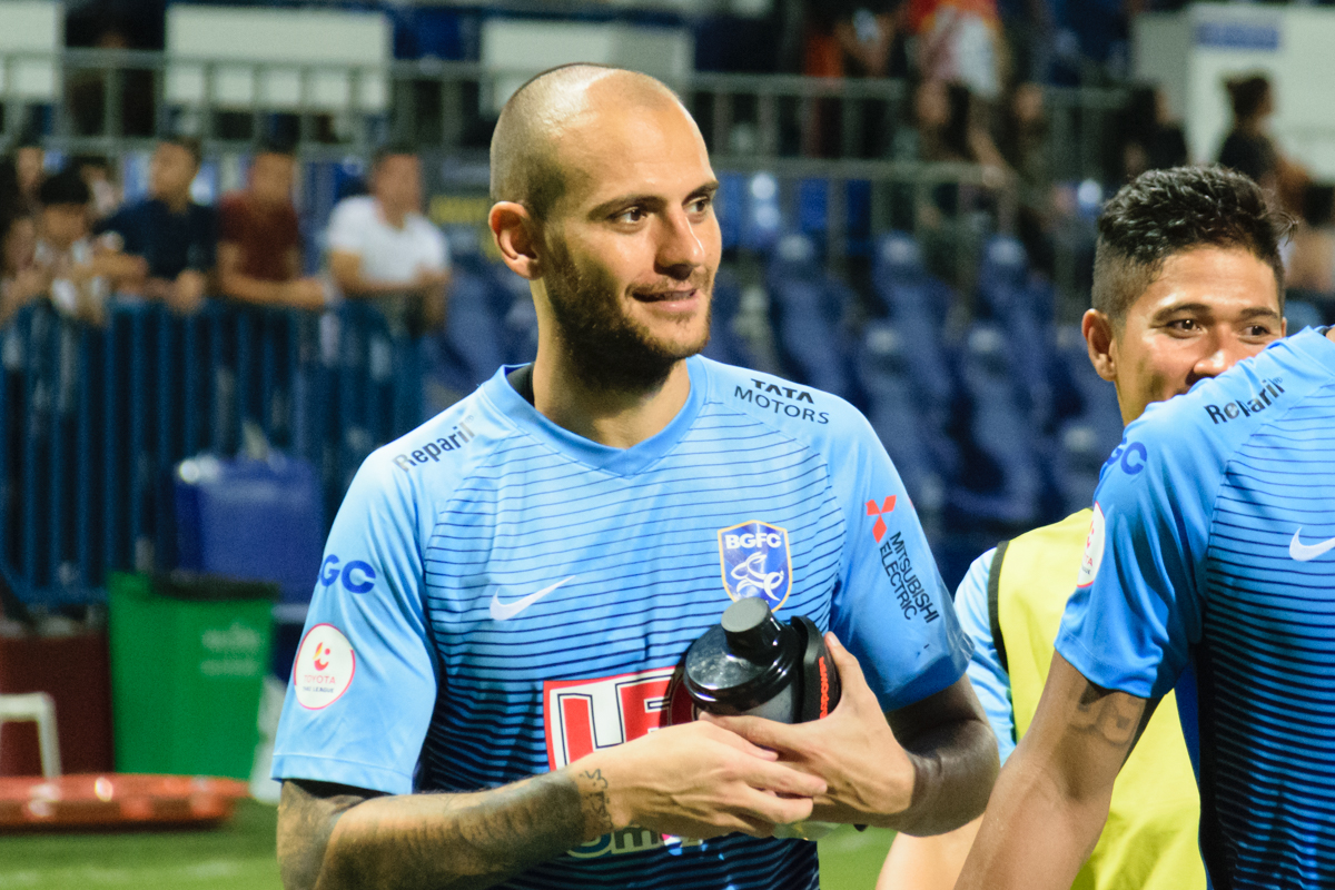 Kiko Insa